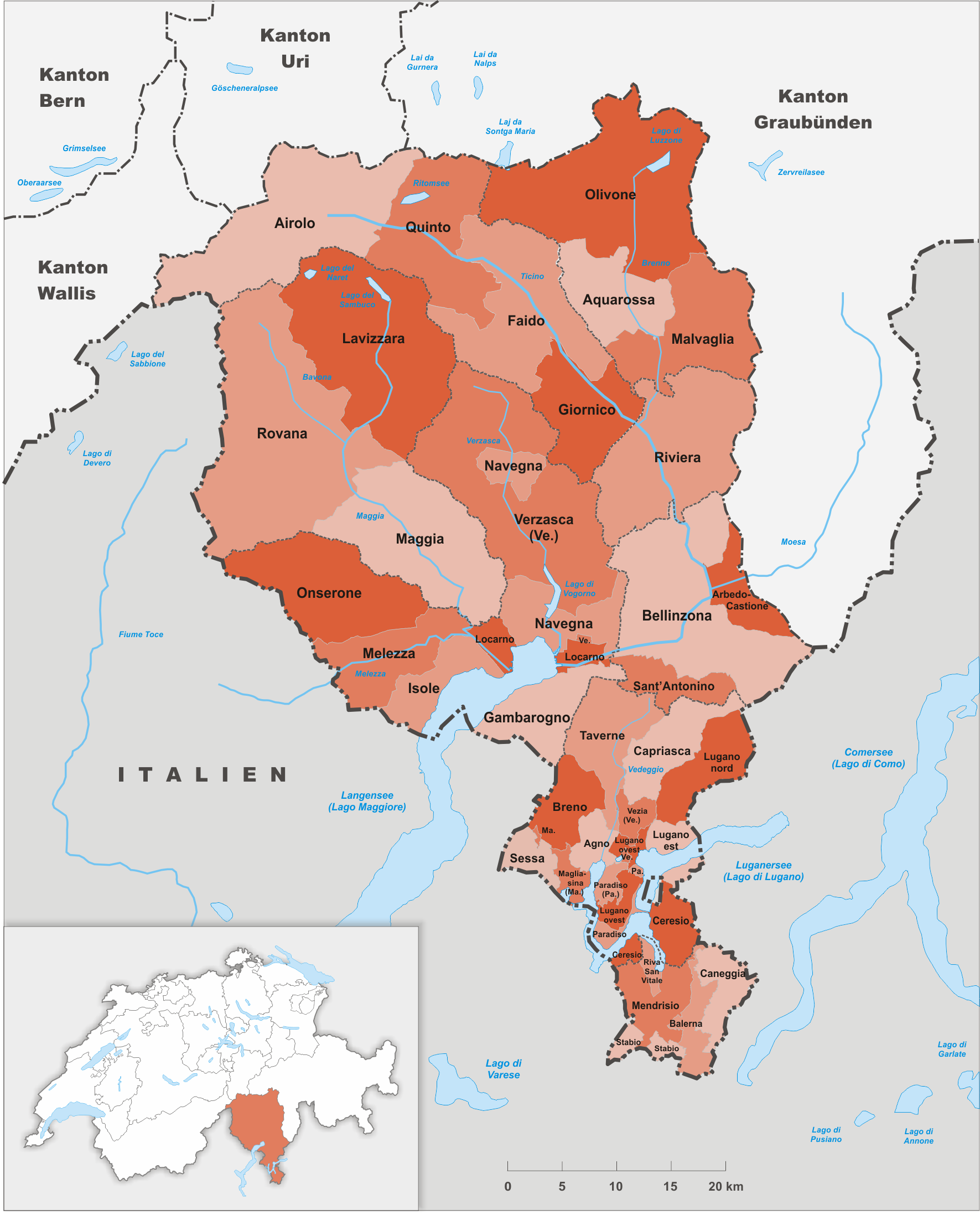 Kreise des Kanton Tessin